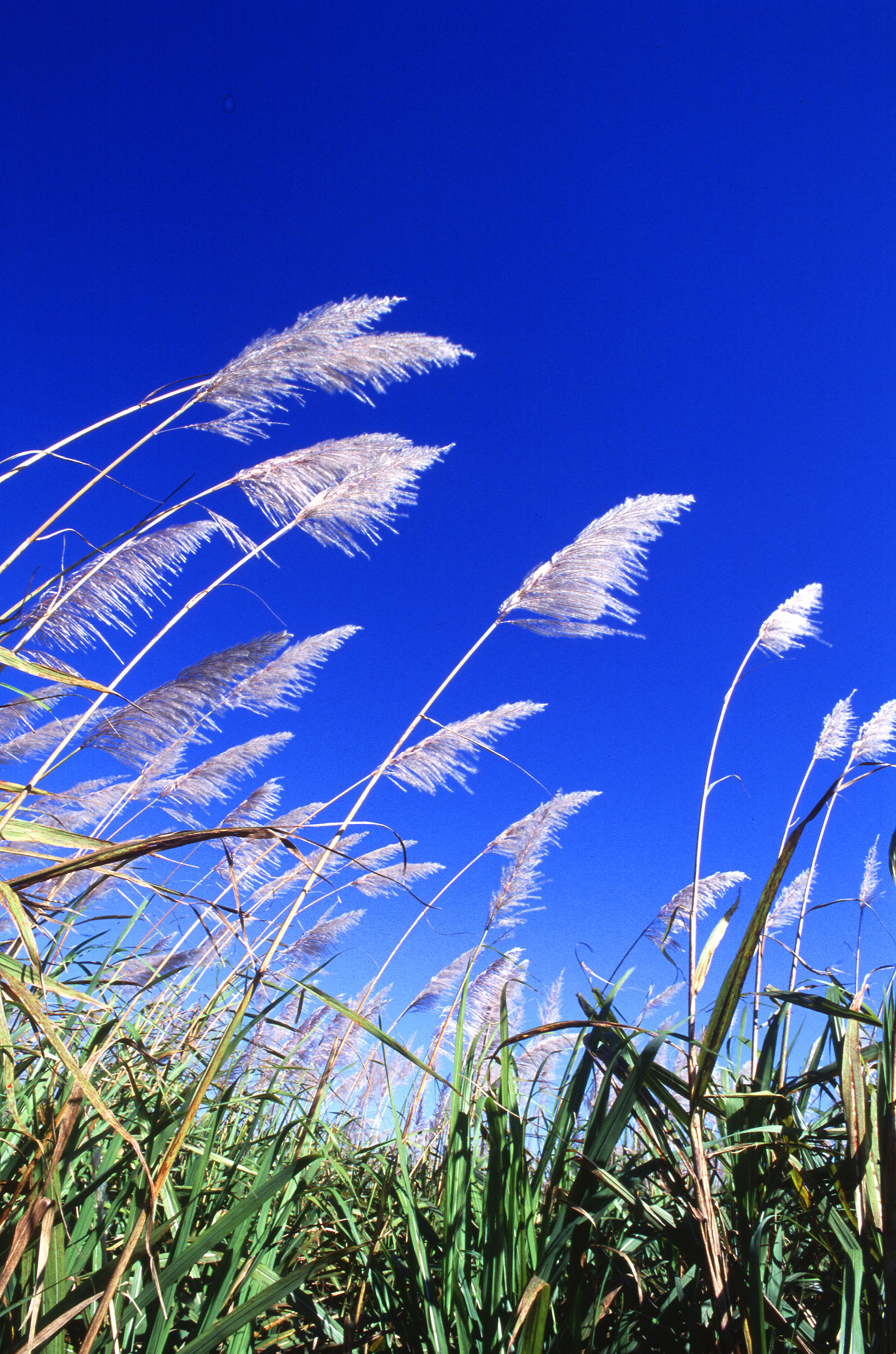 An experimental ARS sugarcane field near Canal Point, Florida.